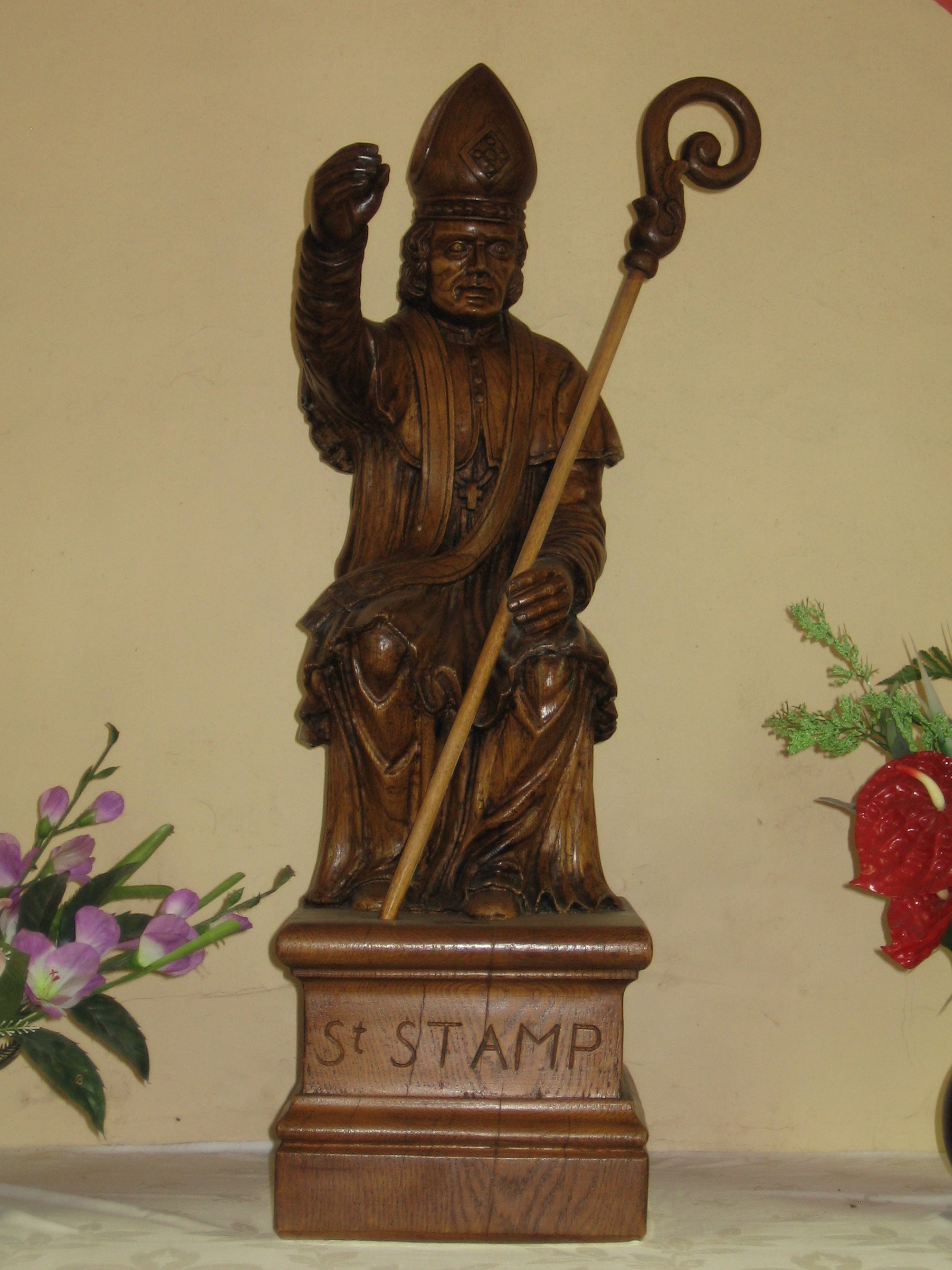 Statue de Saint Stamp, vénéré à Anhée (Belgique)